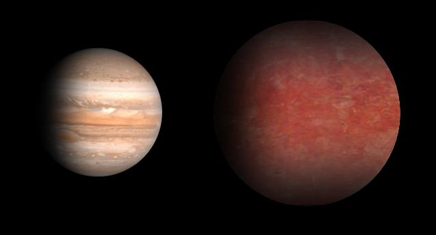 Comparación de tamaños entre el exoplaneta WASP-4b y Júpiter. El color de WASP-4b es supuesto. Sirve para cualquier exoplaneta con un radio = 1.44 el de Júpiter. Exoplanet WASP-4b and Jupiter relative sizes.